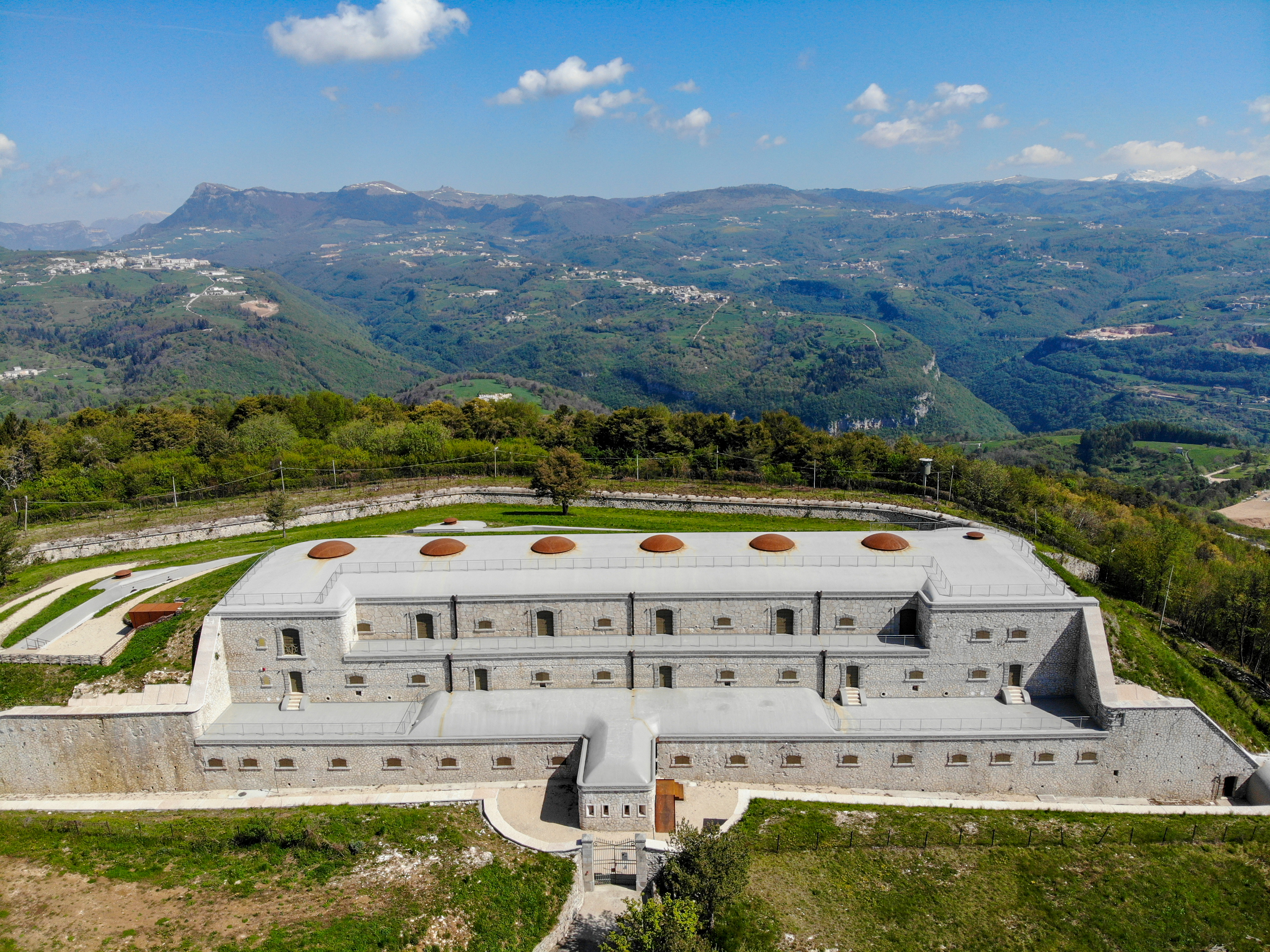 Vista della facciata SUD (rivolta verso Verona) del Forte di Monte Tesoro. Sul tetto spiccano le cupole in acciaio dove un tempo sorgevano le torrette corazzate che ospitavano cannoni 149/A che difendevano, verso le montagne a NORD, il confine con l'allora impero Austro-Ungarico